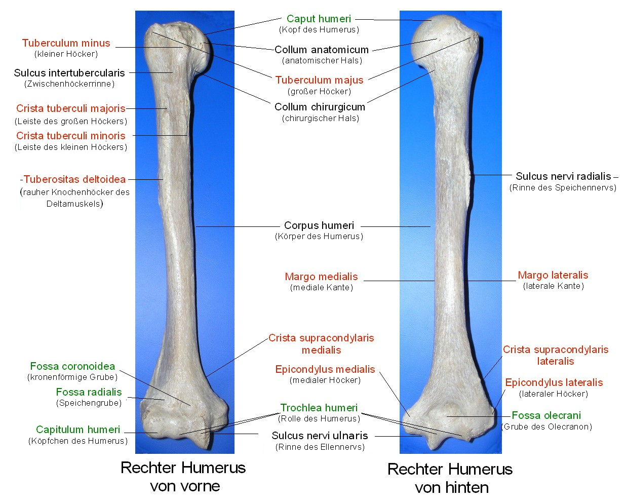 Humerus von vorne und hinten mit deutscher Beschriftung